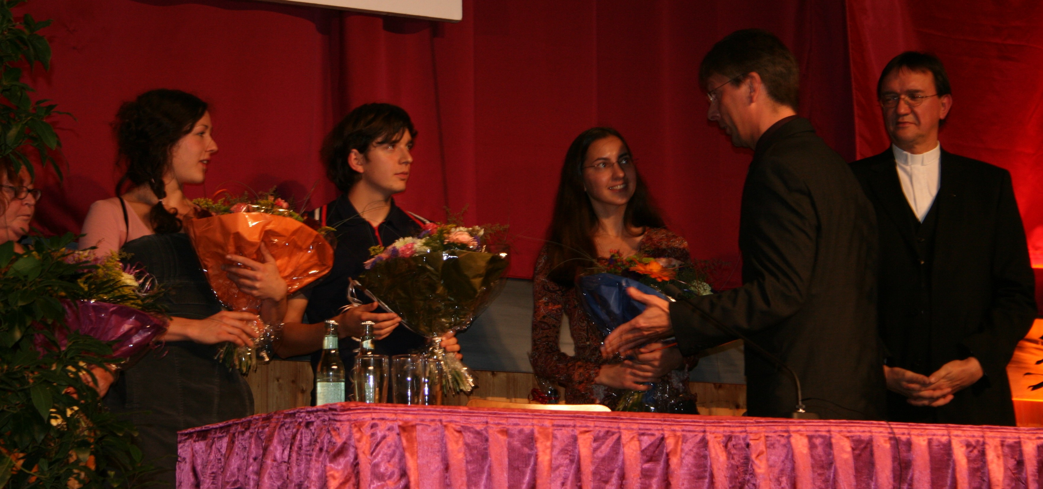 Preisträger des Holzhäuser Heckethaler 2006 bei der Preisverleihung mit dem Bürgermeister von Immenhausen (Andreas Güttler) und dem Bischof von Kassel (Martin Hein)